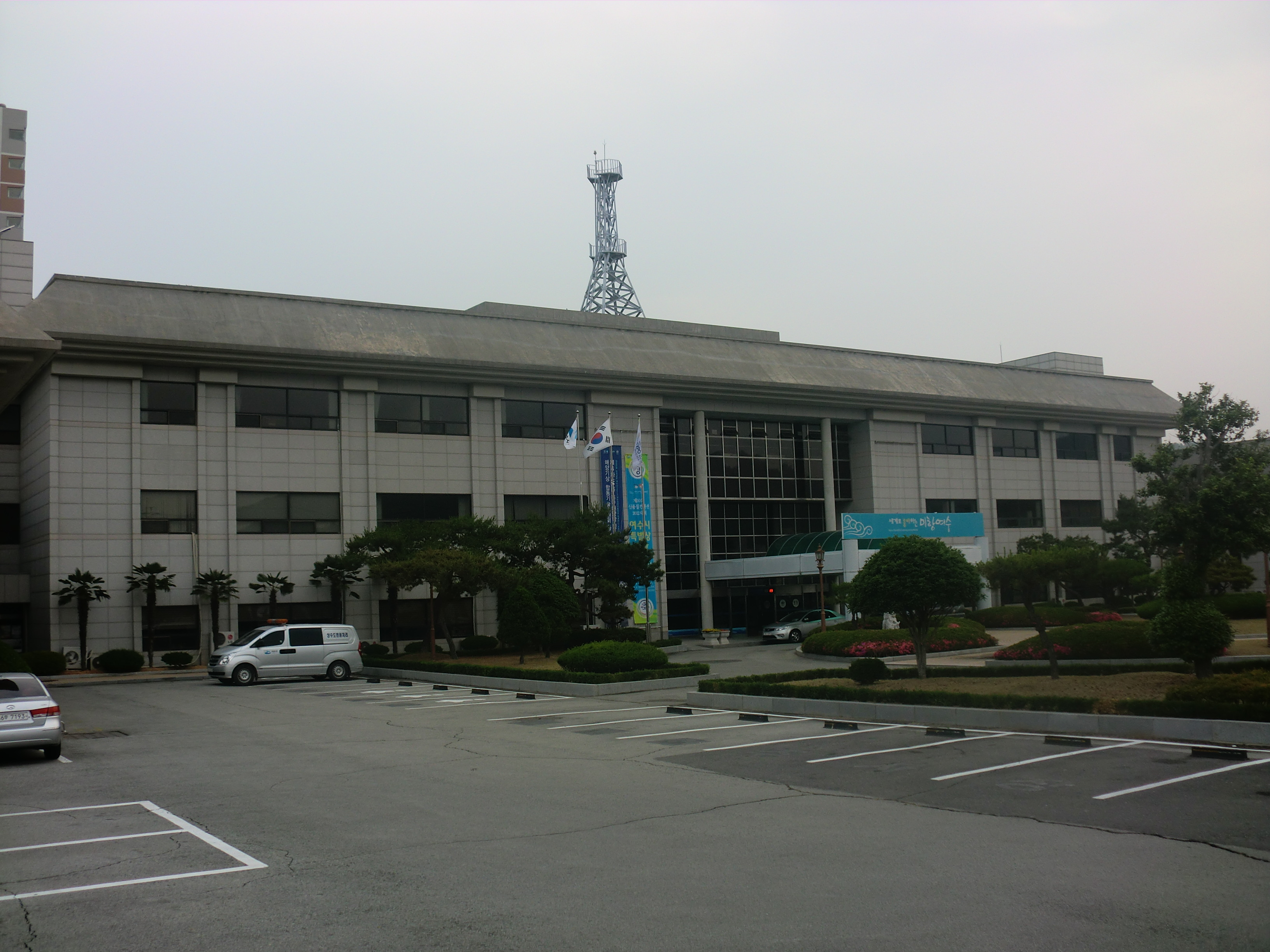 여수시청 돌산청사(구:여천군청)